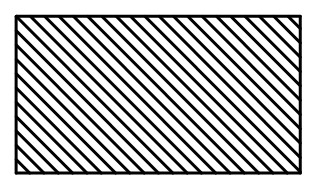 Esou gett e Gebéi op enger Landkaart duergestallt.